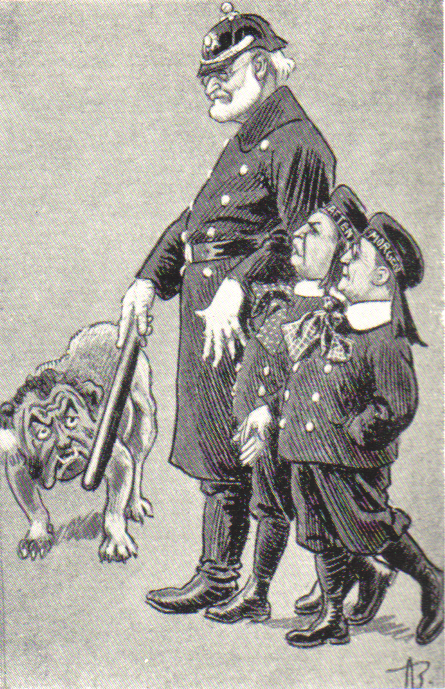 Karikatur av Andreas Bloch fra "Korsaren" 1905. Stortingspresident Carl Berner beskytter redaktørene Amandus Schibsted (Aftenposten) og Nils Vogt (Morgenbladet) mot Ola Thommesen (Verdens Gang).